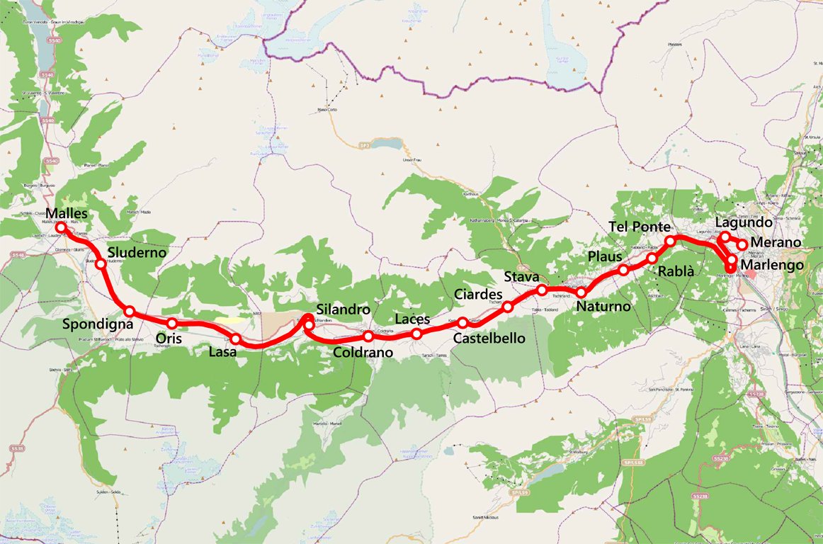 Mappa della ferrovia Merano-Malles